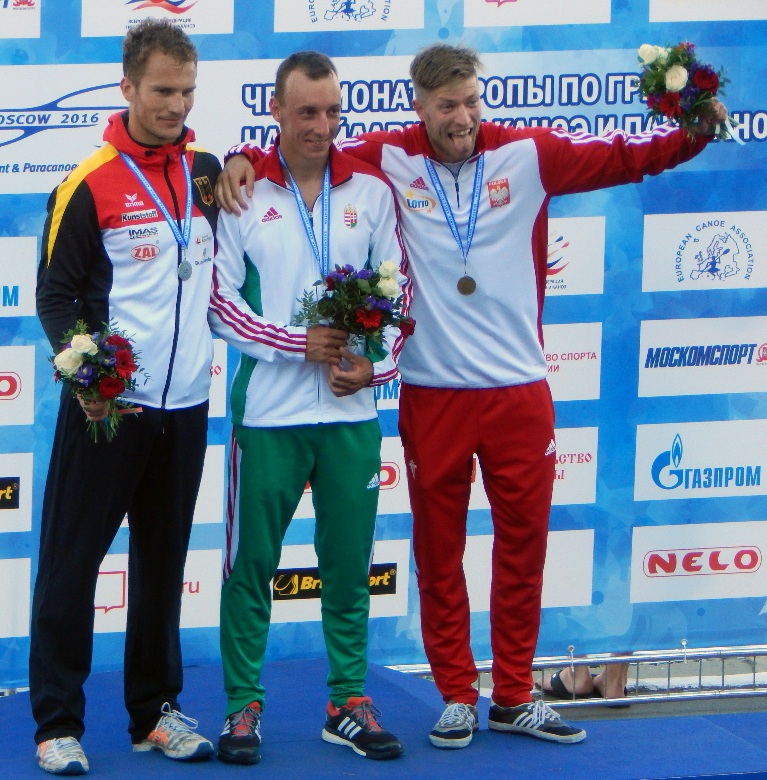 Чемпионат Европы по гребле на байдарках и каноэ. Церемония награждения мужчин-байдарочников на дистанции 5000 метров